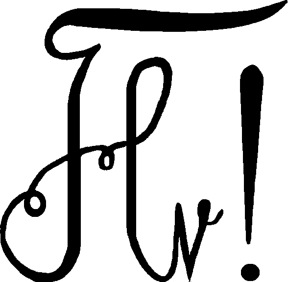 Logo Corps Hannovera Hannover